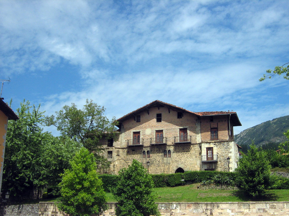 Casa-Torre de Balda, en el municipio guipuzcoano de Akzoitia. En ella residió Marina de Licona, madre de Ignacio de Loyola.